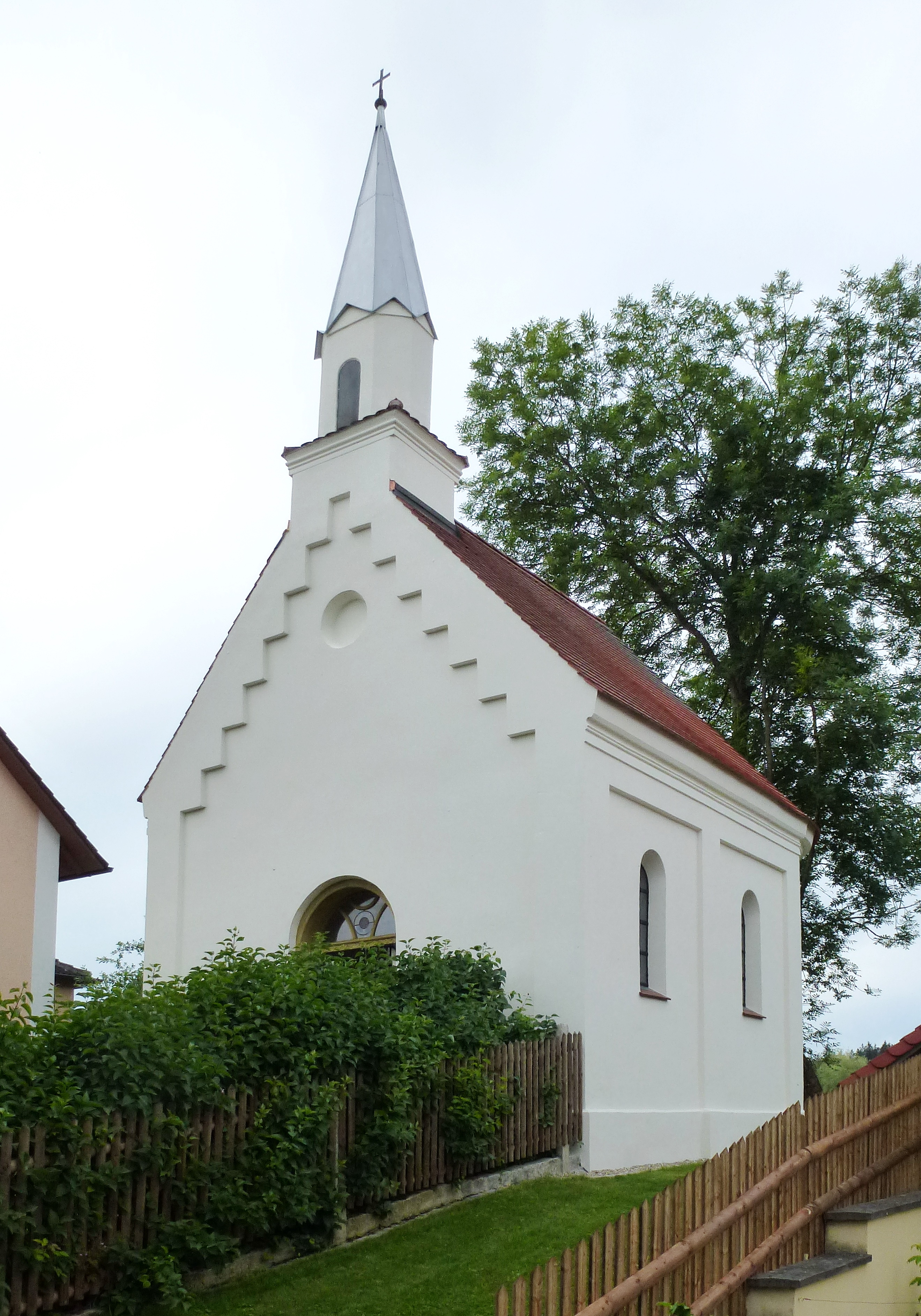 Fränking, Kapellenweg 8, Marienkapelle: Aufnahme aus NNO